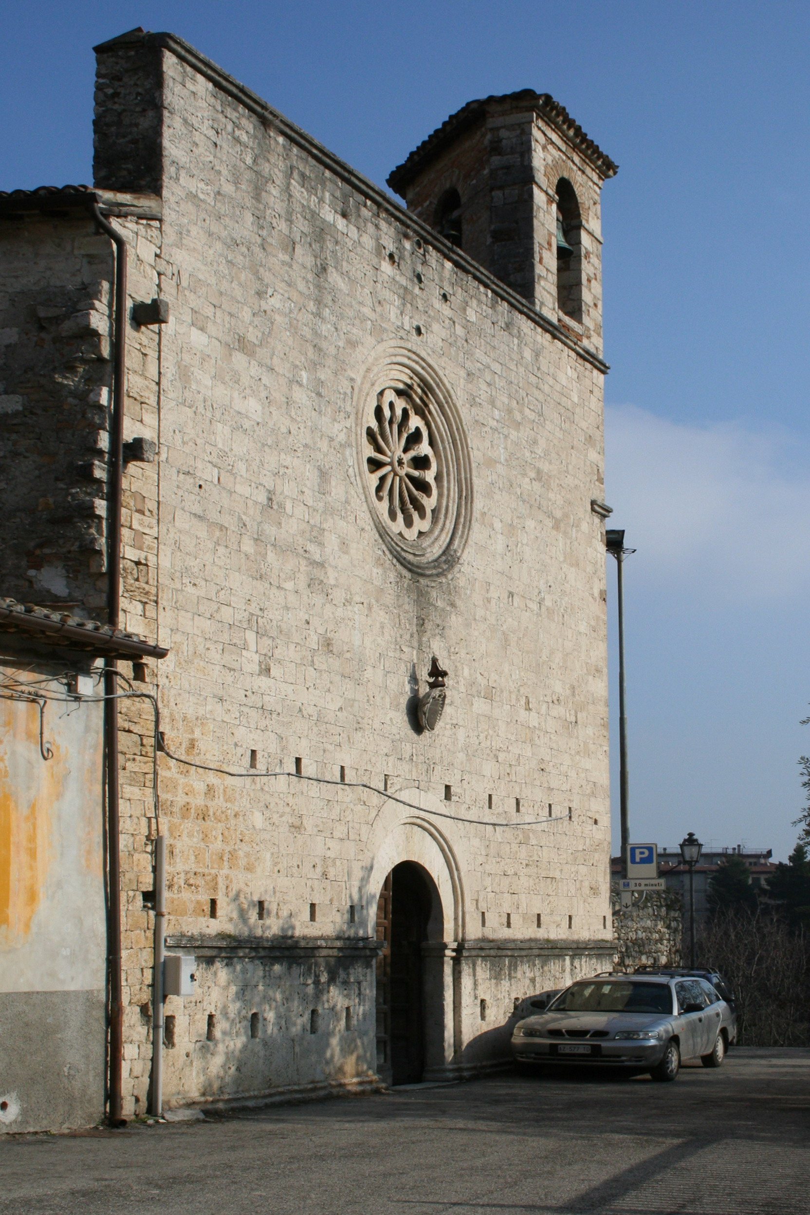 Facciata della Chiesa di San Pietro in Castello di Ascoli Piceno.